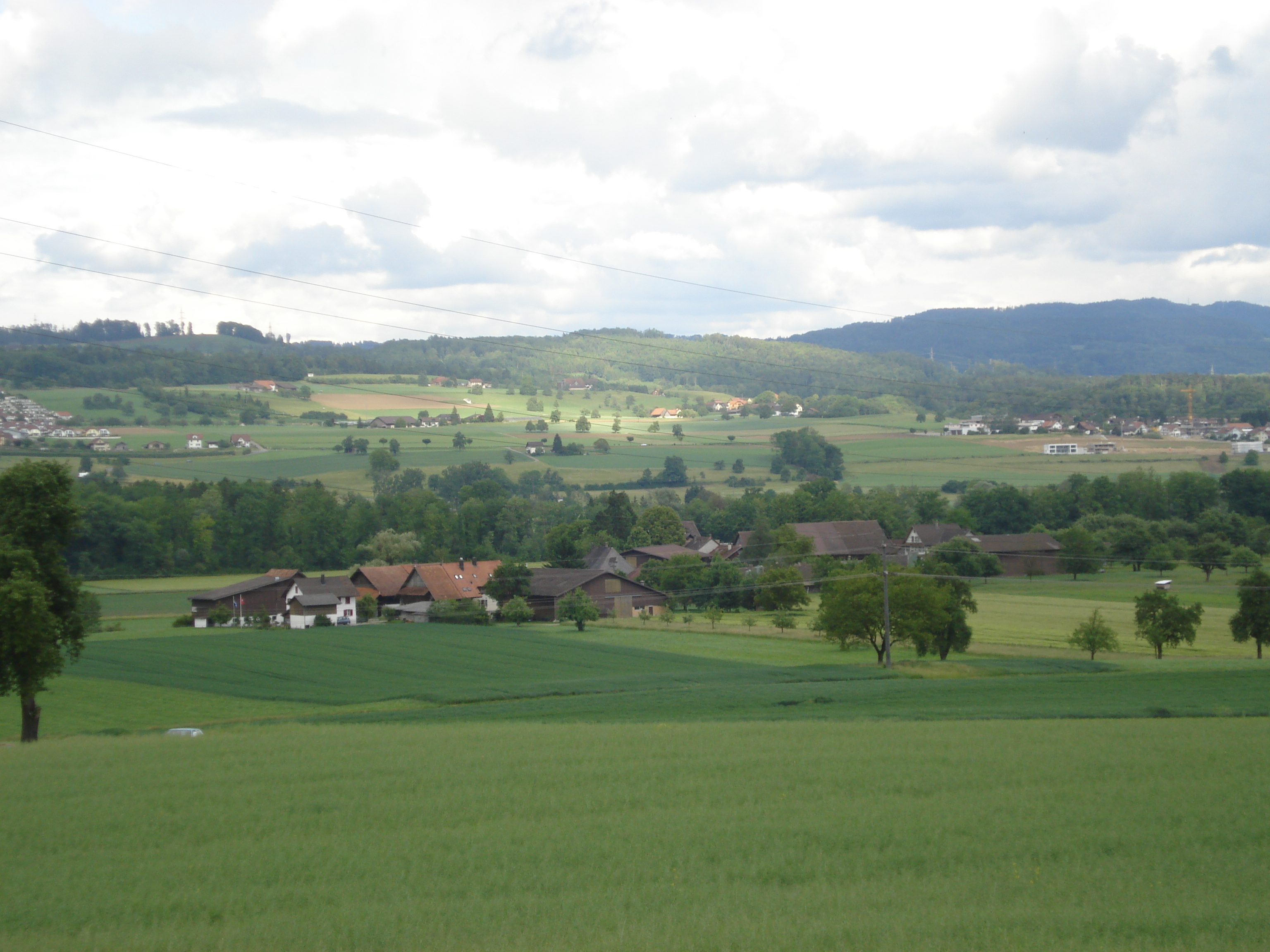 Foti vom Dörfli Werd be Rotteschwil/Imago viculi Werd apud Rottenschwil